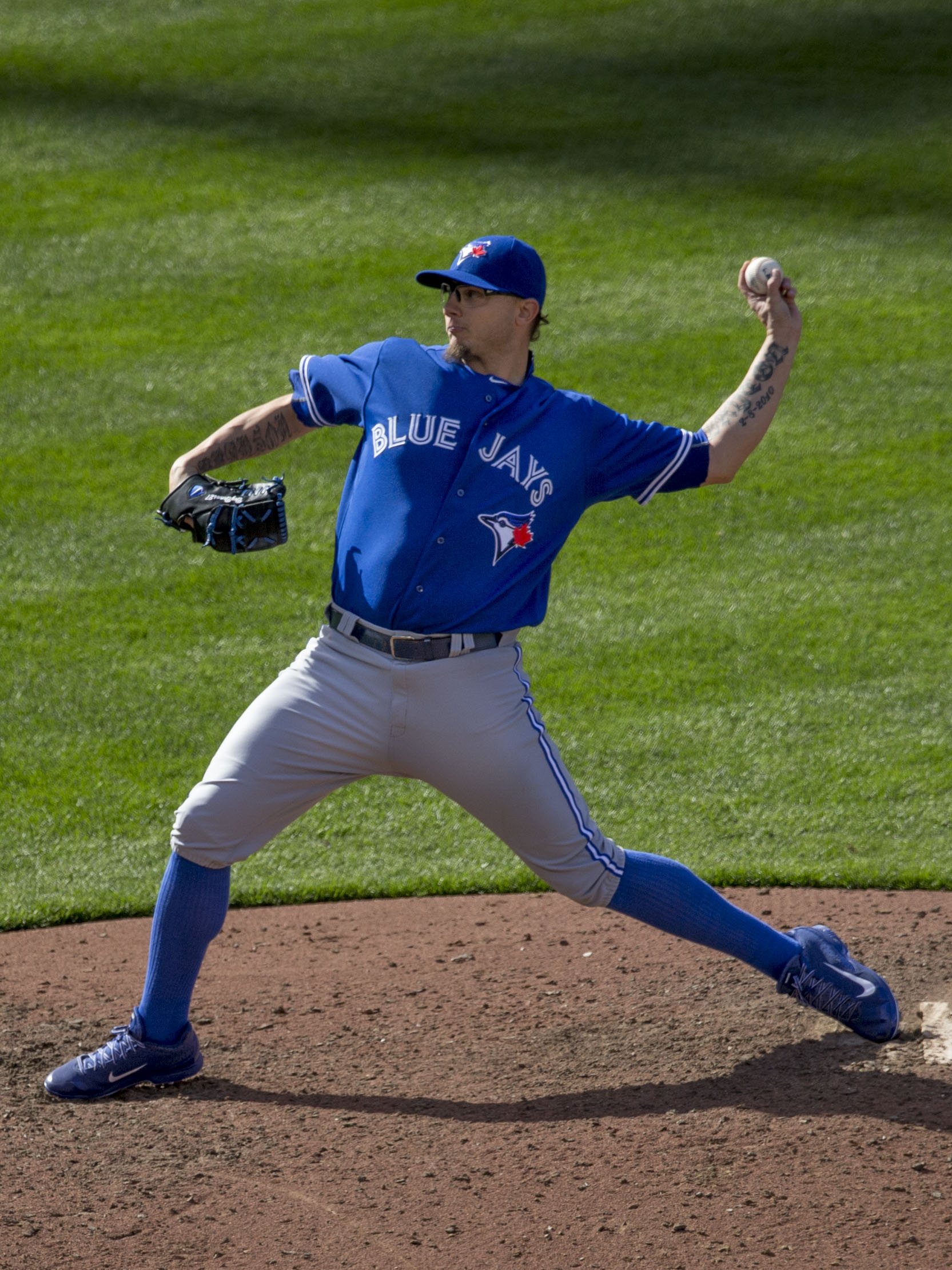 Blue Jays at Orioles 04/12/15